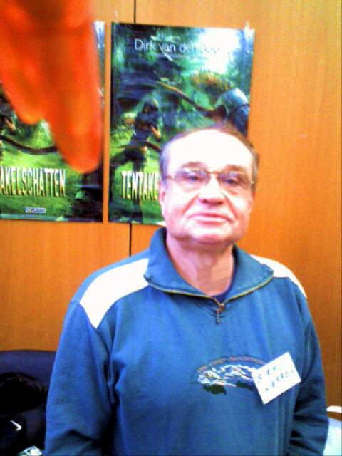 Walter Appel (Earl Warren) auf dem Buchmesseon 2008